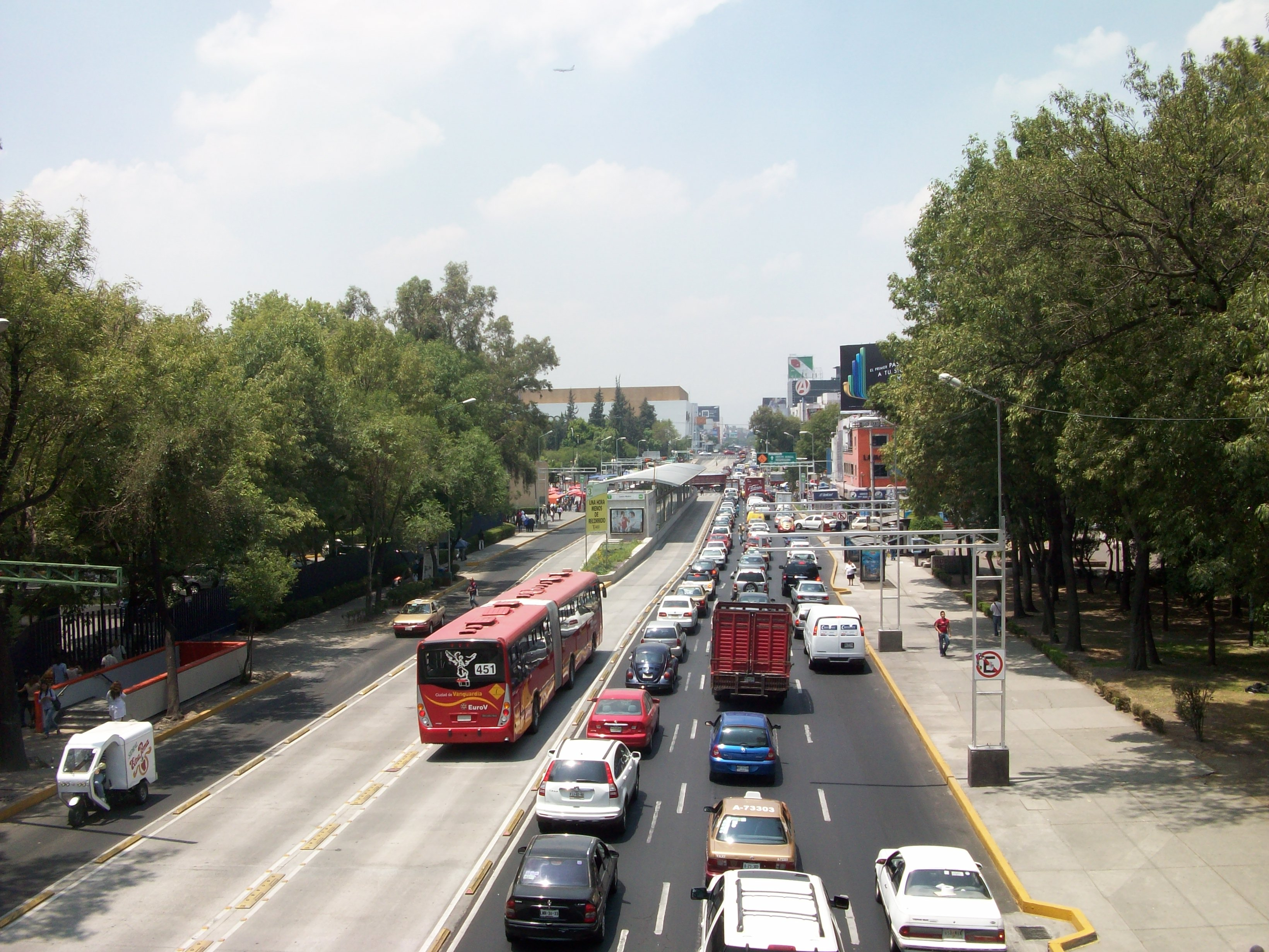 Eje 1 poniente